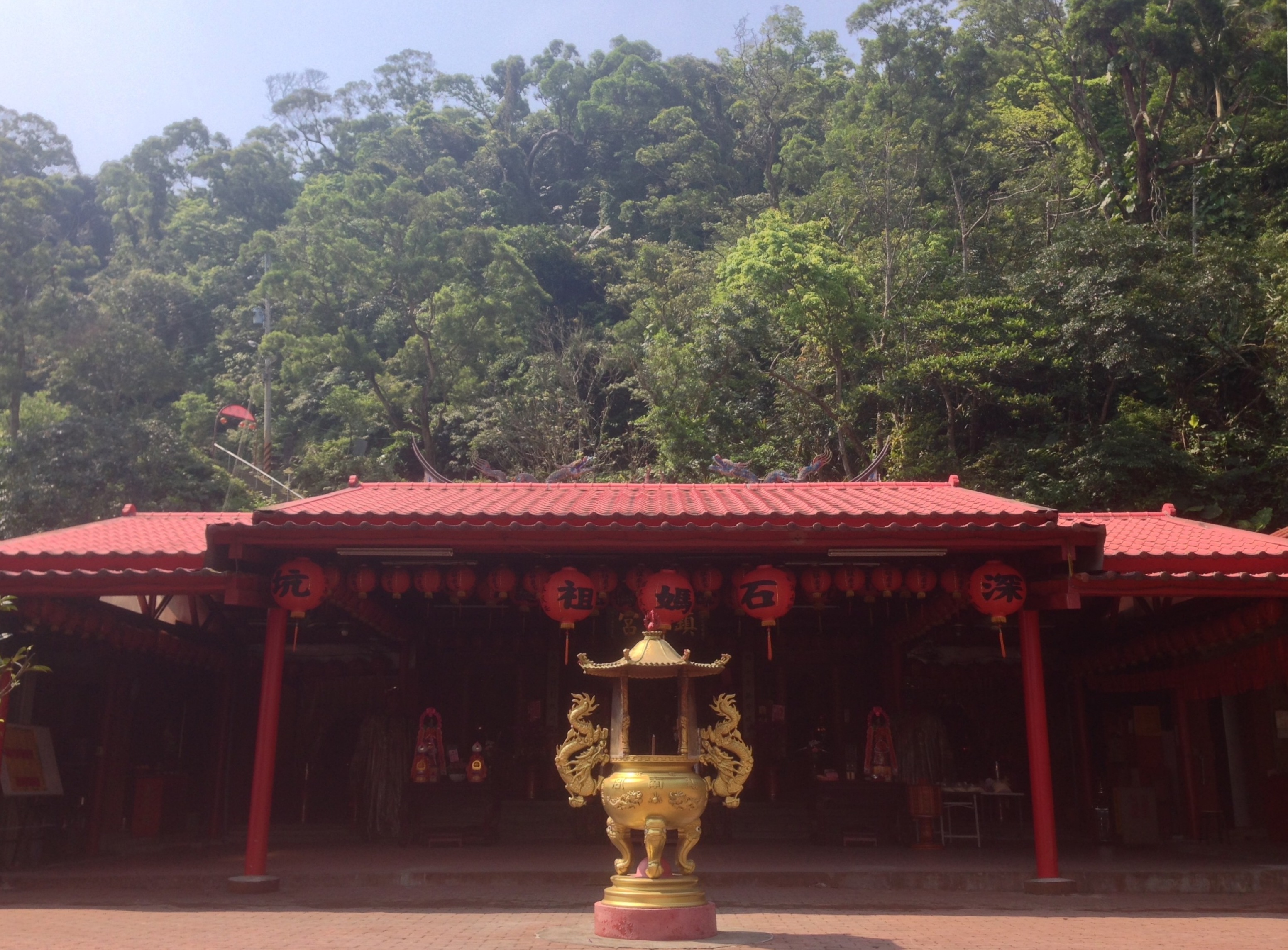 鎮南宮石媽祖正面照